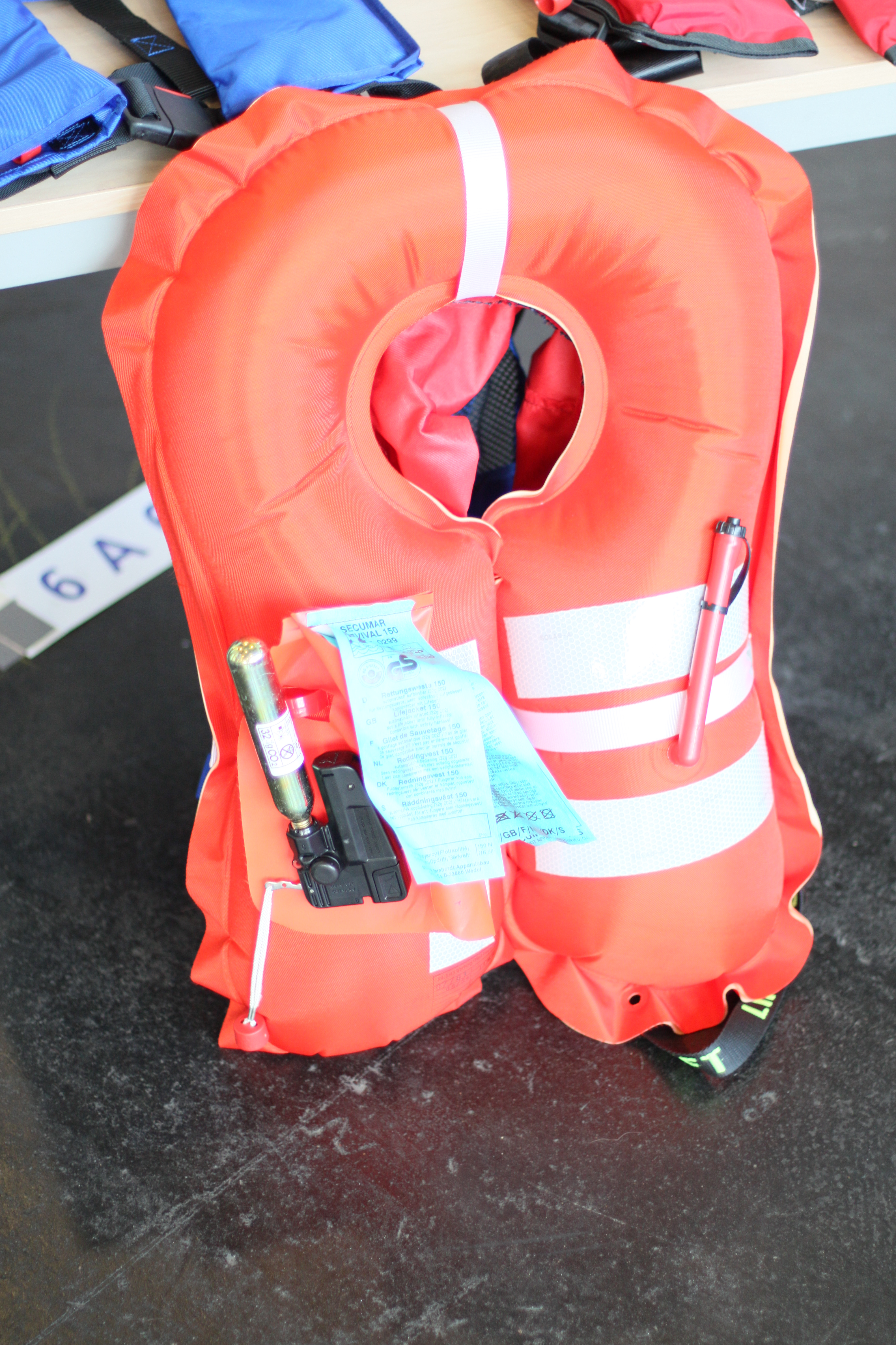 Rettungsweste , gesehen auf der Messe Bremen "Boatfit 2011"